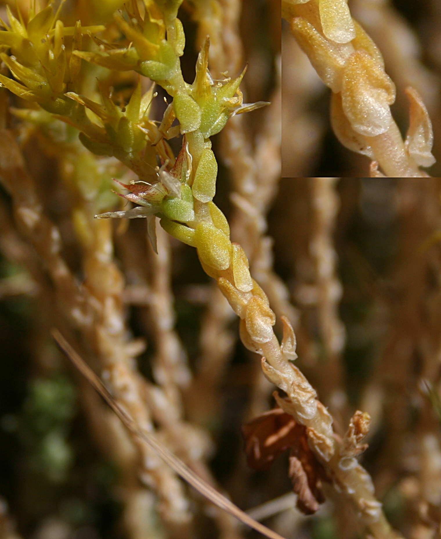 Łodyga rozchodnika ostrego